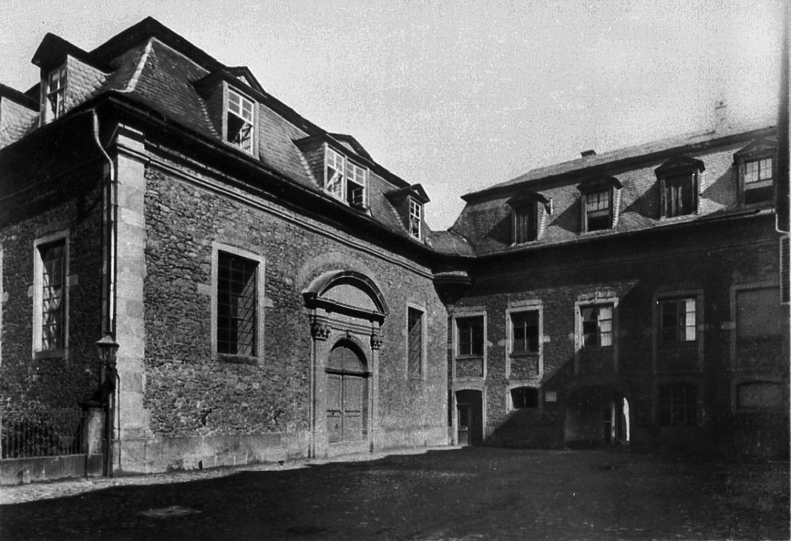 Stadtschloss Hanau,Friedrichsbau.